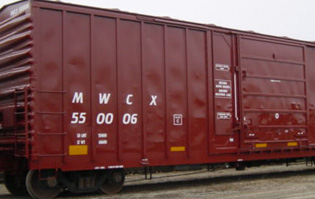 Boxcar